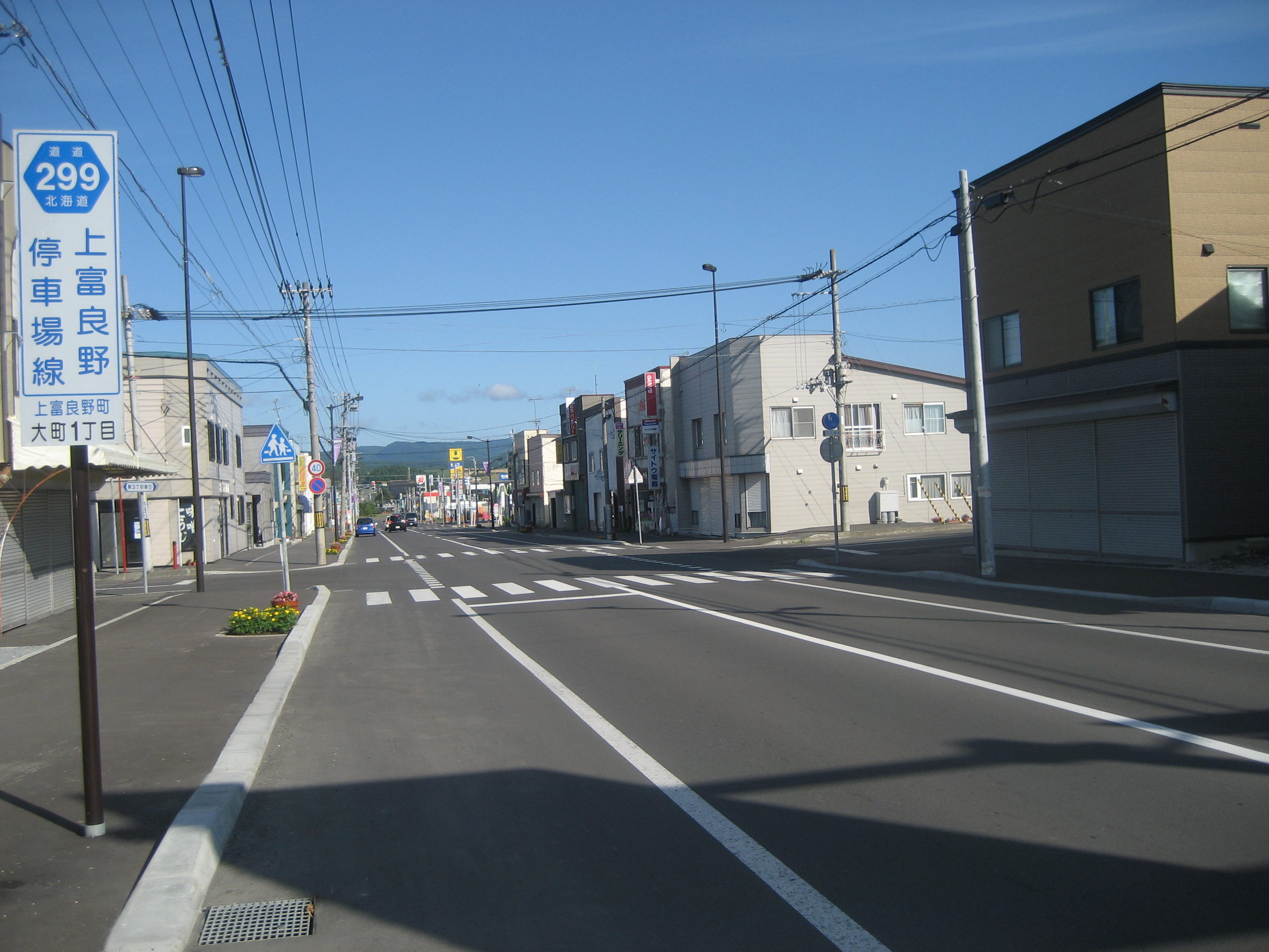 道道299号線上富良野町大町１丁目付近